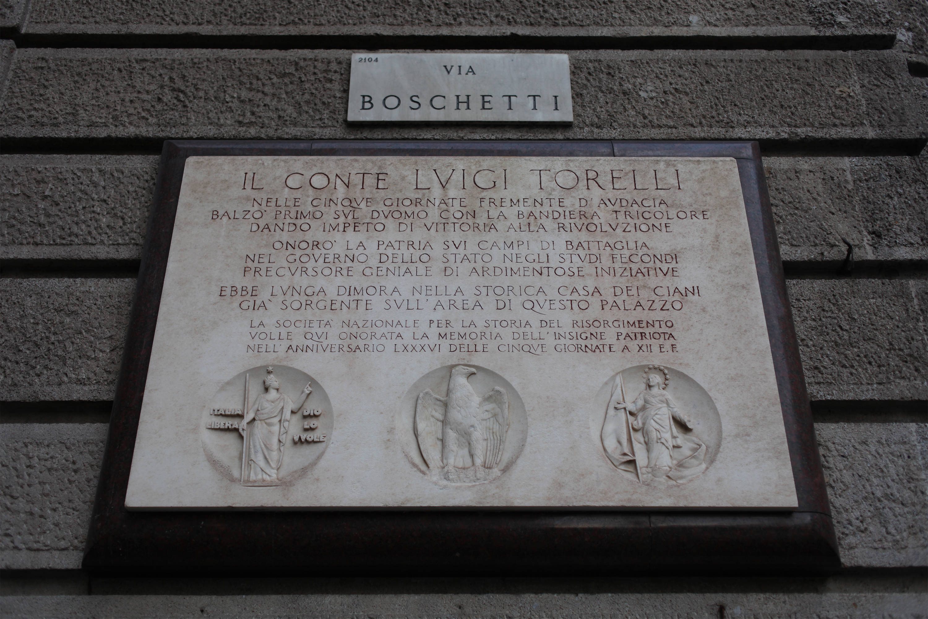 Targa a ricordo del conte Luigi Torelli (1934) anno XII dell'Era fascista, palazzo dei Ciani, Milano